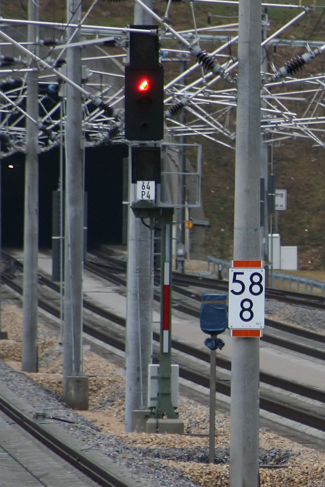 Ein Halt zeigendes Ks-Signal